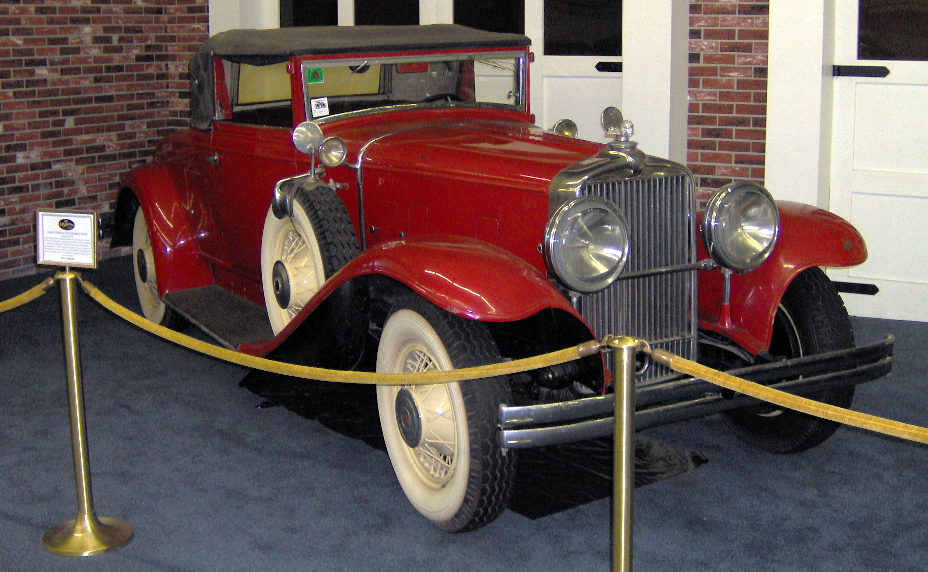 1930 Stutz DV-32 Convertible Coupe